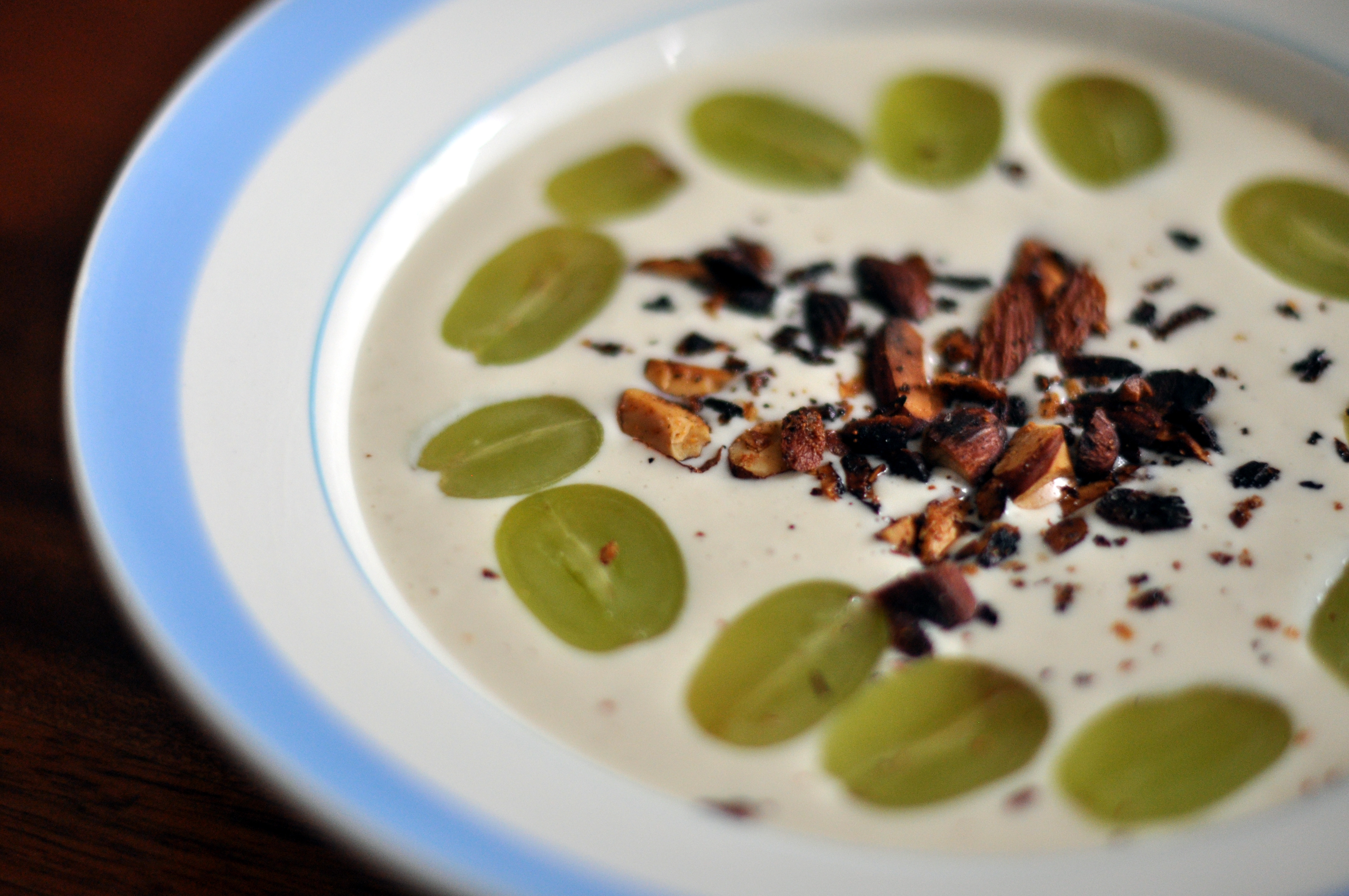 Ajo blanco